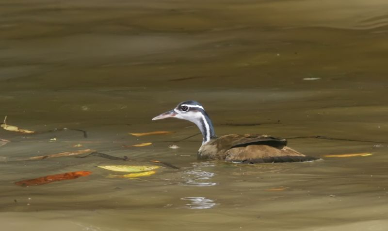 Sungrebe in Costa Rica